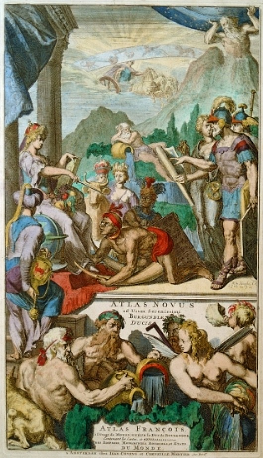 title page=Atlas Novus / Atlas Francois... Duc du Bourgogne;size=48x27cm